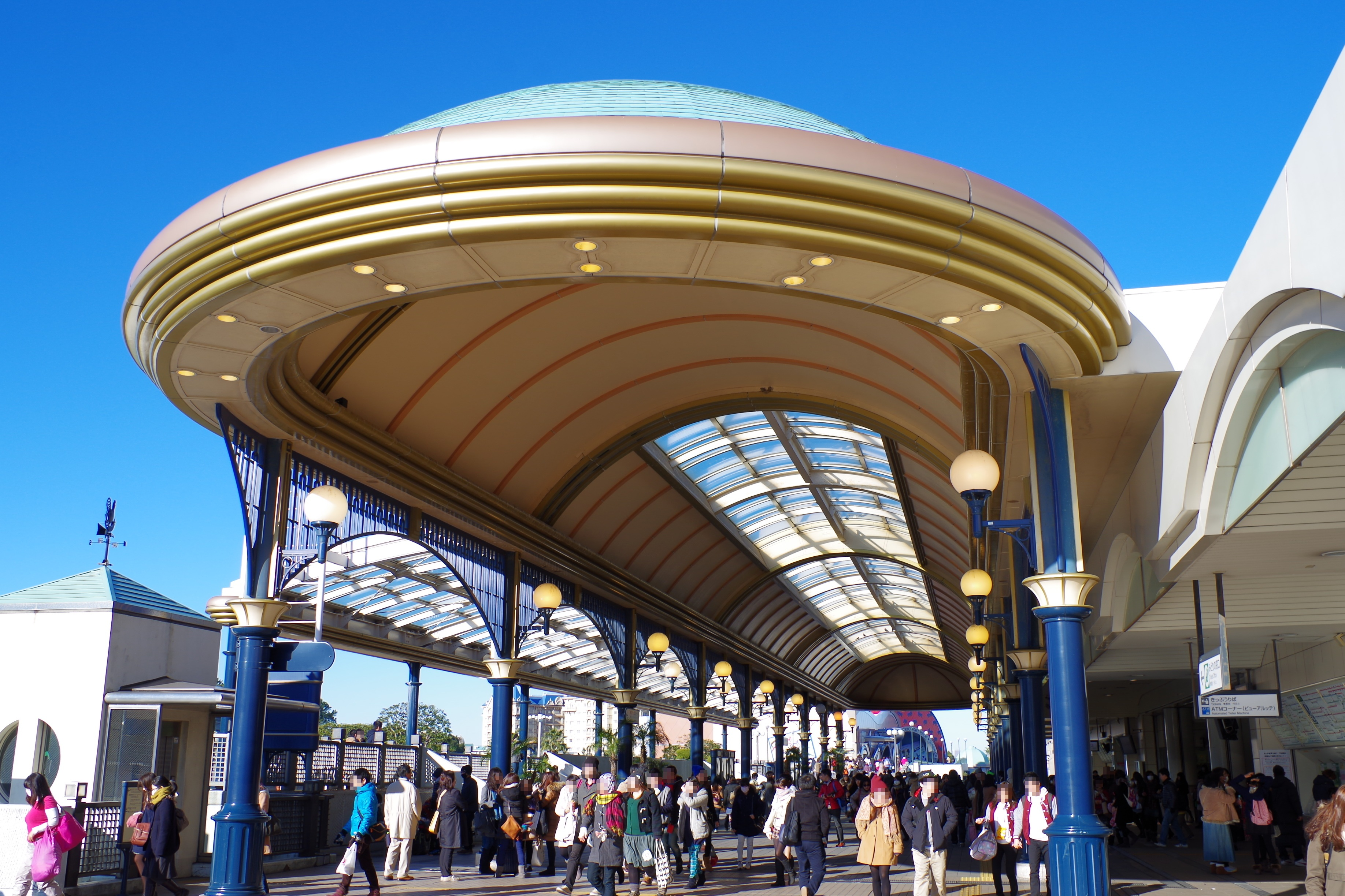 JR京葉線 舞浜駅 Maihama sta. 2015.1.03